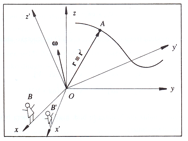 Elkarrekiko biraka aridiren bi sistemaren kasuari buruzko irudia